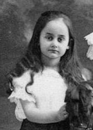 Sophie von Luxemburg